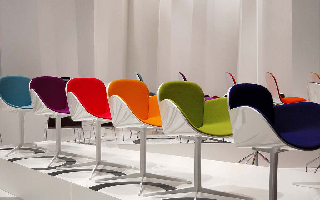 ...muta d'accento e di pensiero